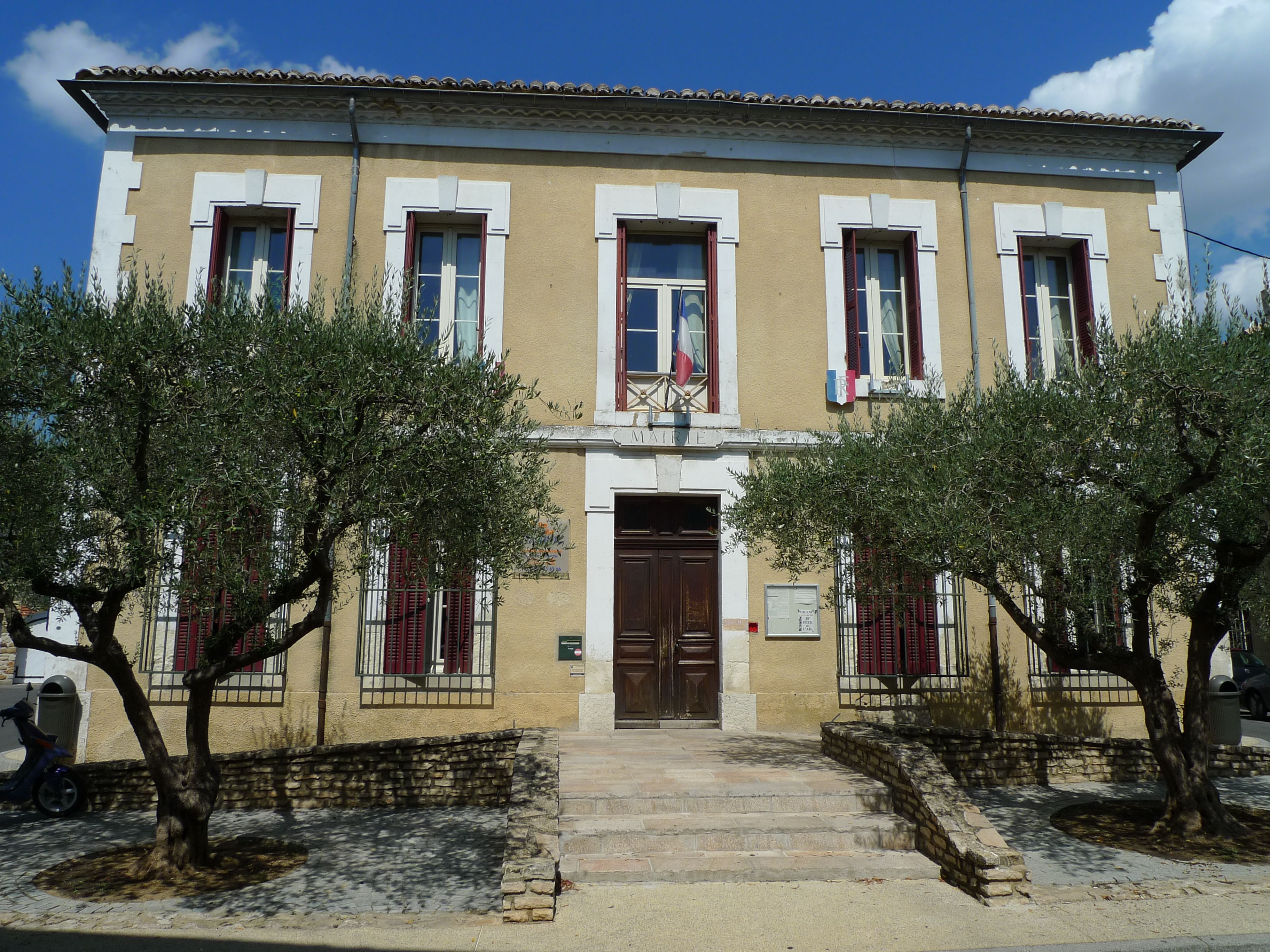 La mairie de Piolenc avec son aménagement pittoresque.